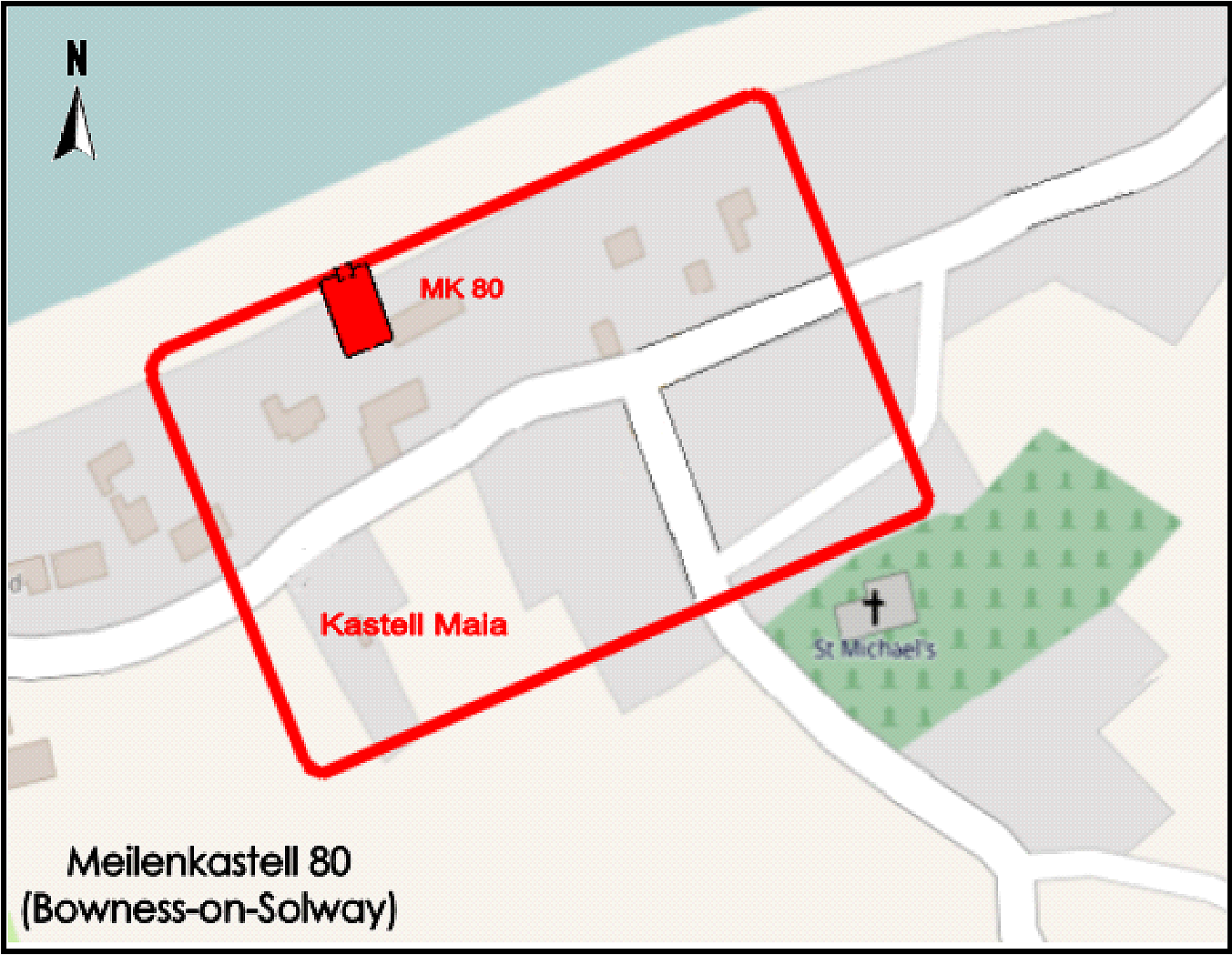 Lageskizze des Meilenkastell 80 (Hadrianswall), Bowness-on-Solway, GB.